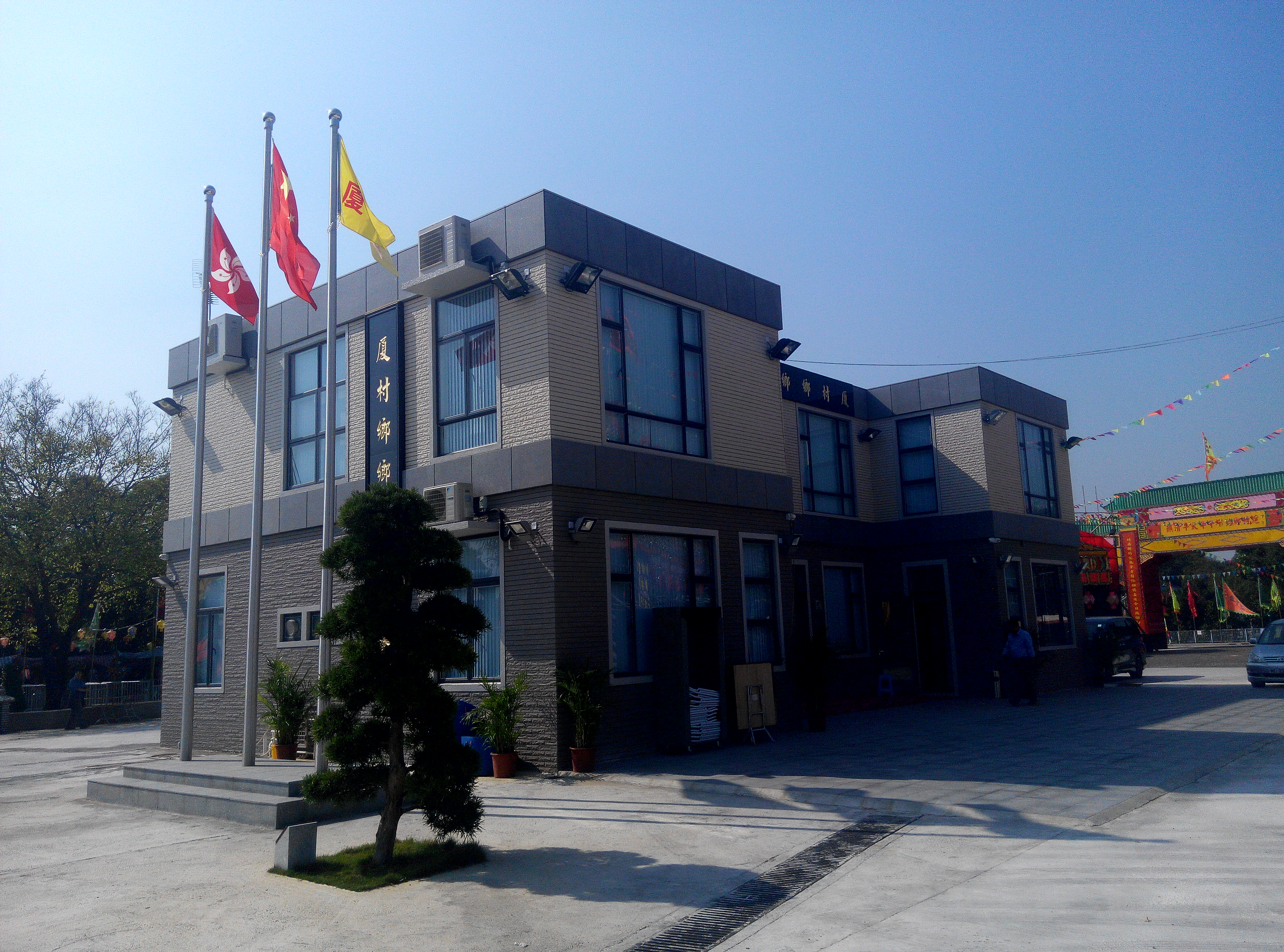 中文（香港）: 廈村鄉鄉事委員